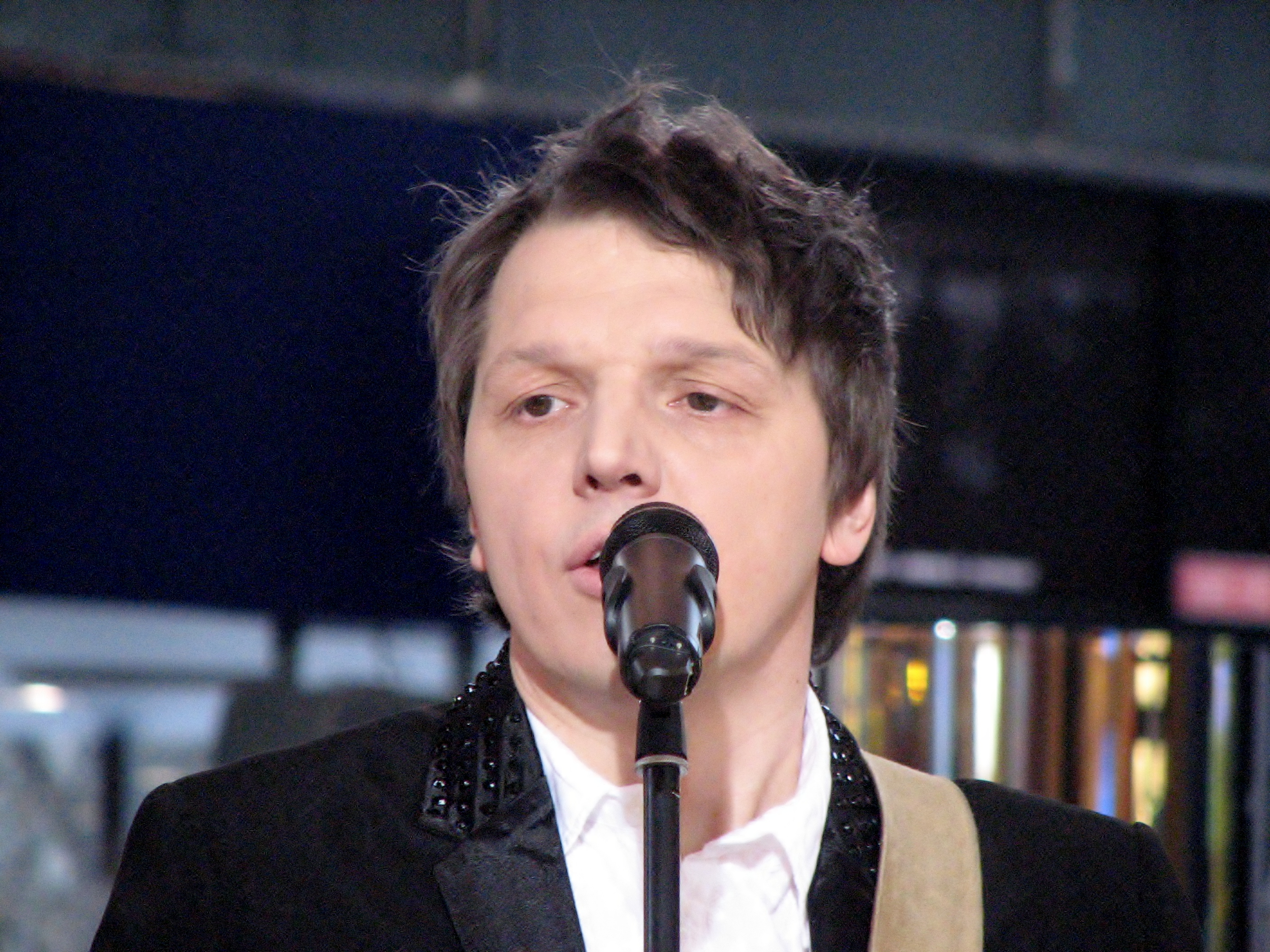 Kalle Raudmets Ringvaate Eesti Laulu salvestusel